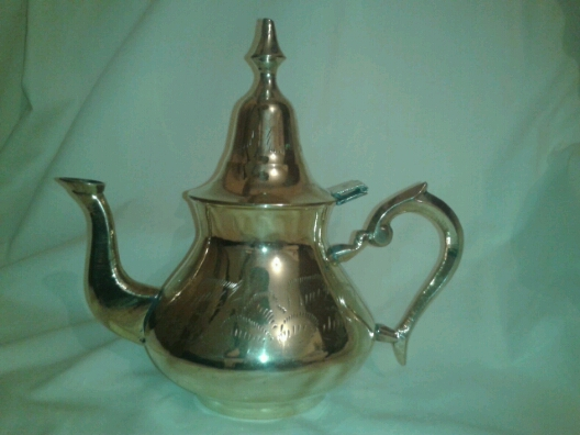 brique algerien